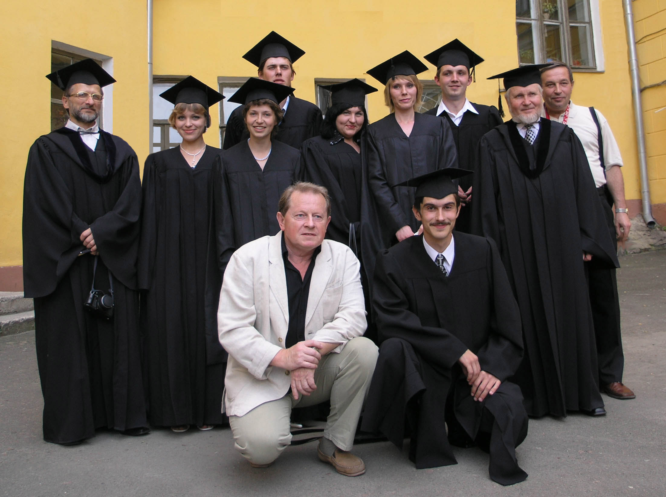 Преподаватели Киево-Могилянской академии: Л. Л. Зализняк (первый слева в нижнем ряду), Кухарчук Ю. В. (первый слева в верхнем ряду), Отрощенко В. В. (второй справа в верхнем ряду), Зубарь В. М. (первый справа в верхнем ряду)) — и студенты-магистры